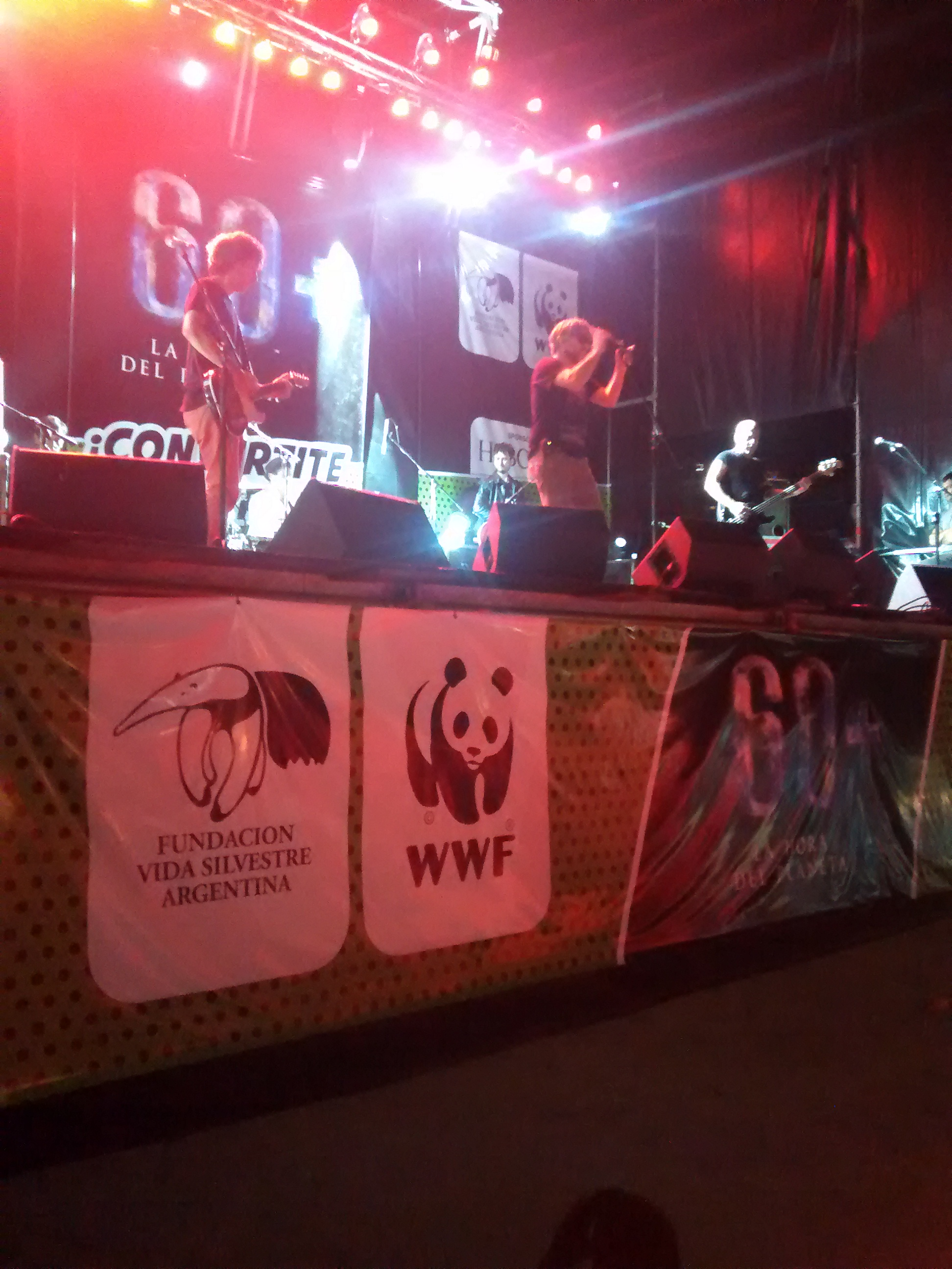 La Hora del Planeta 2015 en Buenos Aires